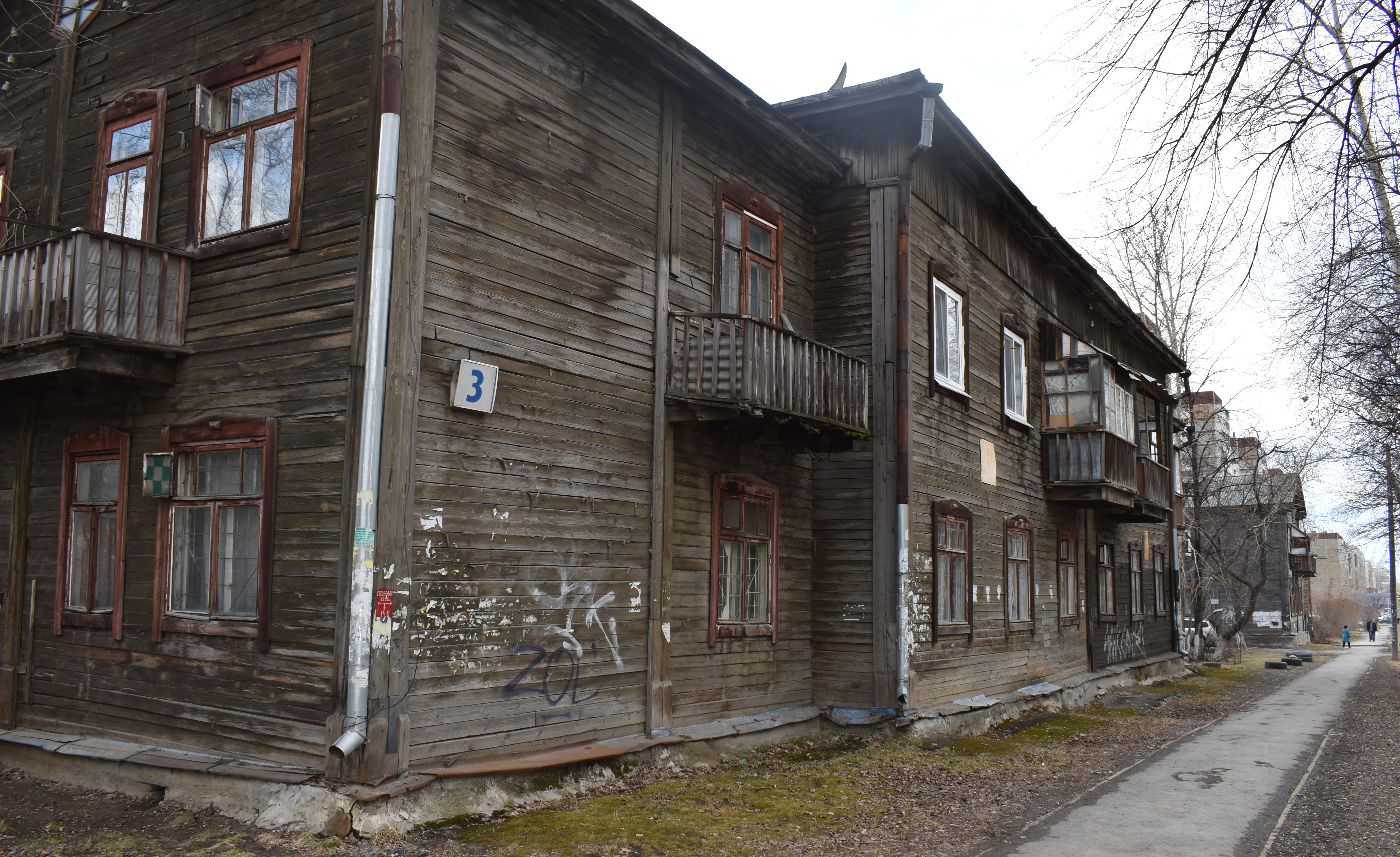 Деревянный двухэтажный дом по адресу Уральских Рабочих, 3